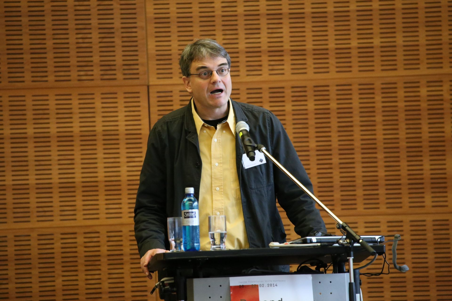 Welche Formen der Solidarität und Kooperation in einer globalisierten Welt können nachhaltige Veränderungen bewirken? Dokumentation der zweiten Frankfurter Hilfe-Konferenz, 20.-22.2.2014.